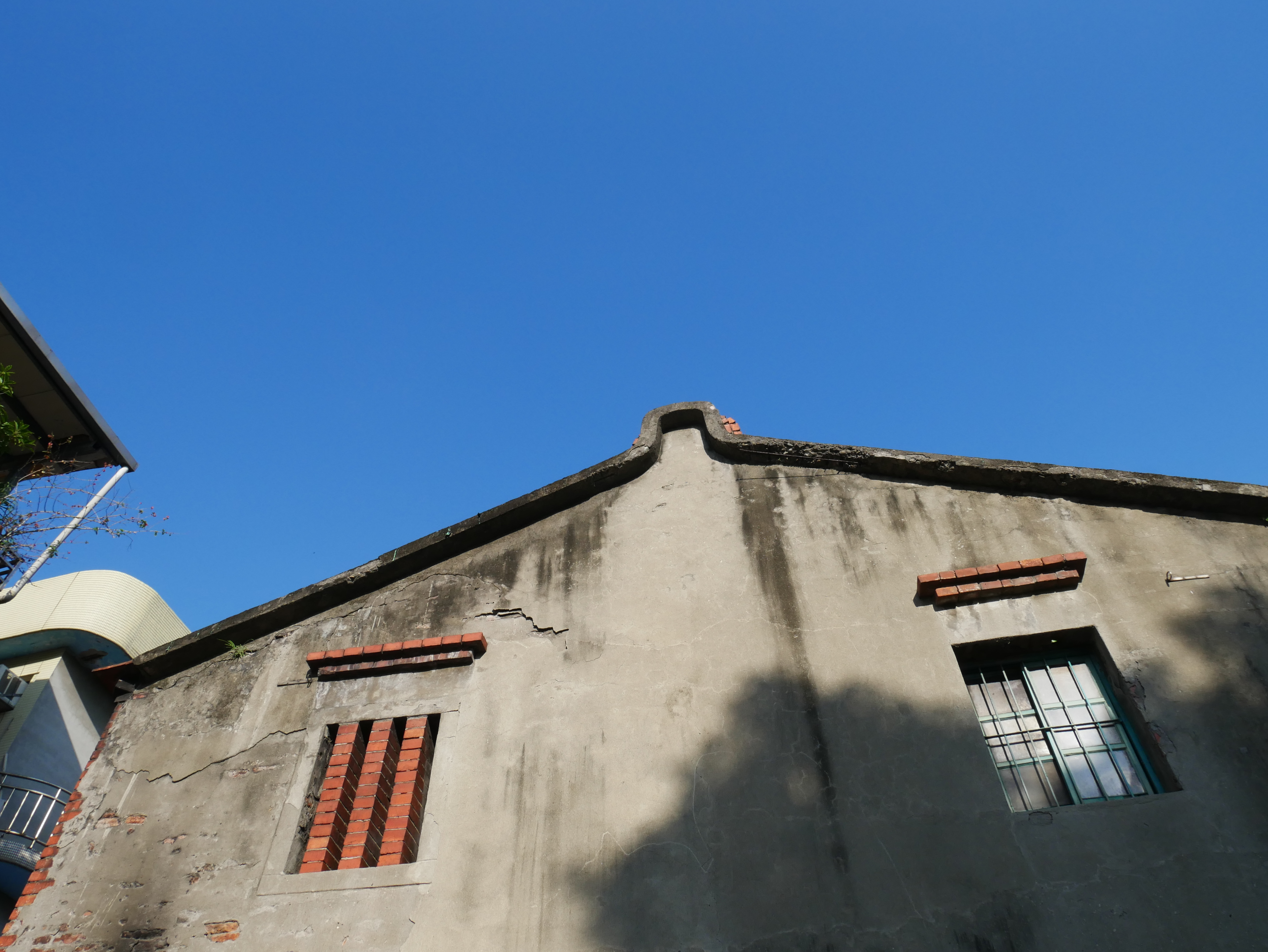 中文（台灣）: 新莊潮江寺木形馬背，新北市新莊區興漢里